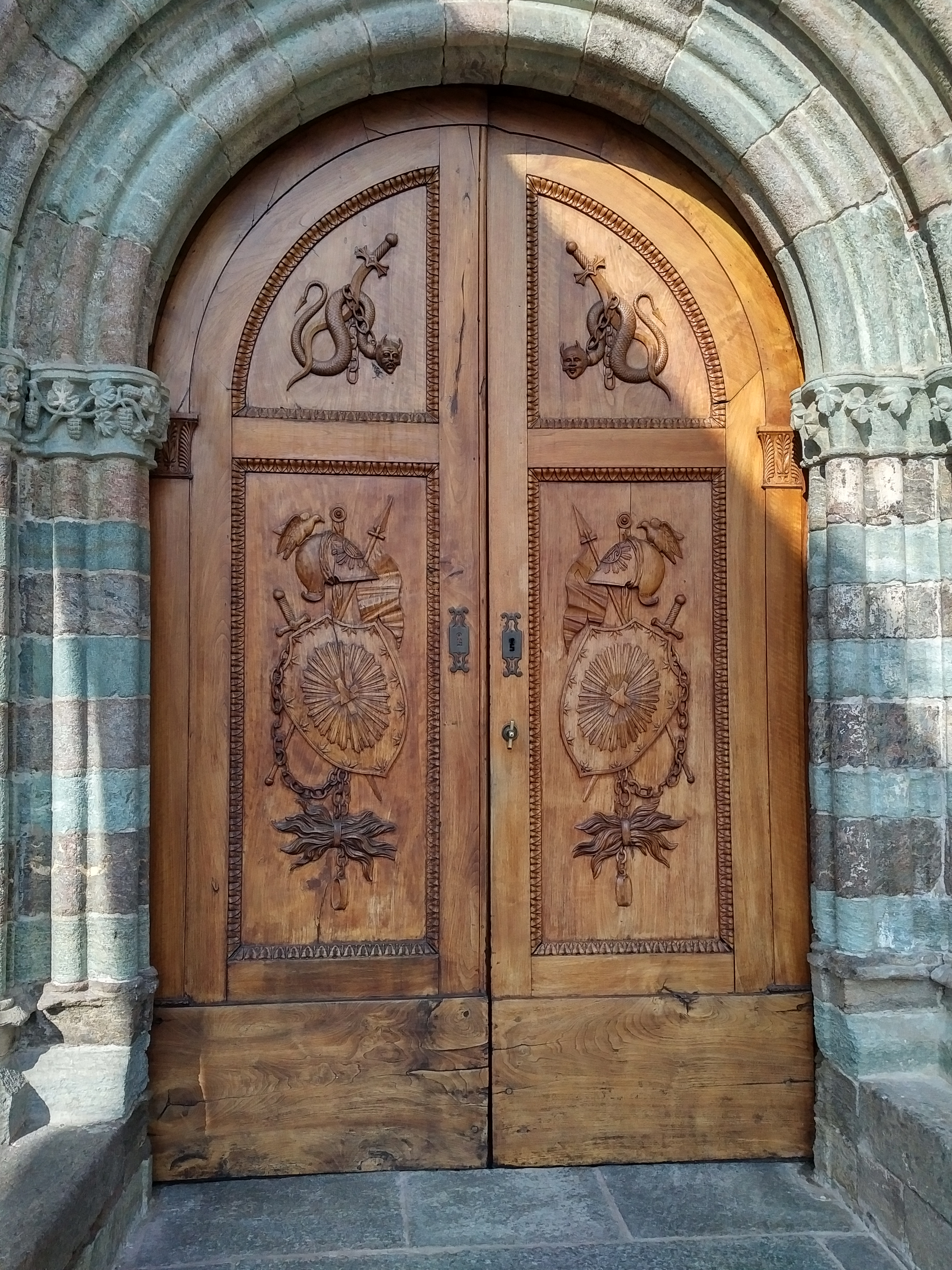 L’abbaye Saint-Michel-de-la-Cluse (Sacra di San Michele), février 2017.